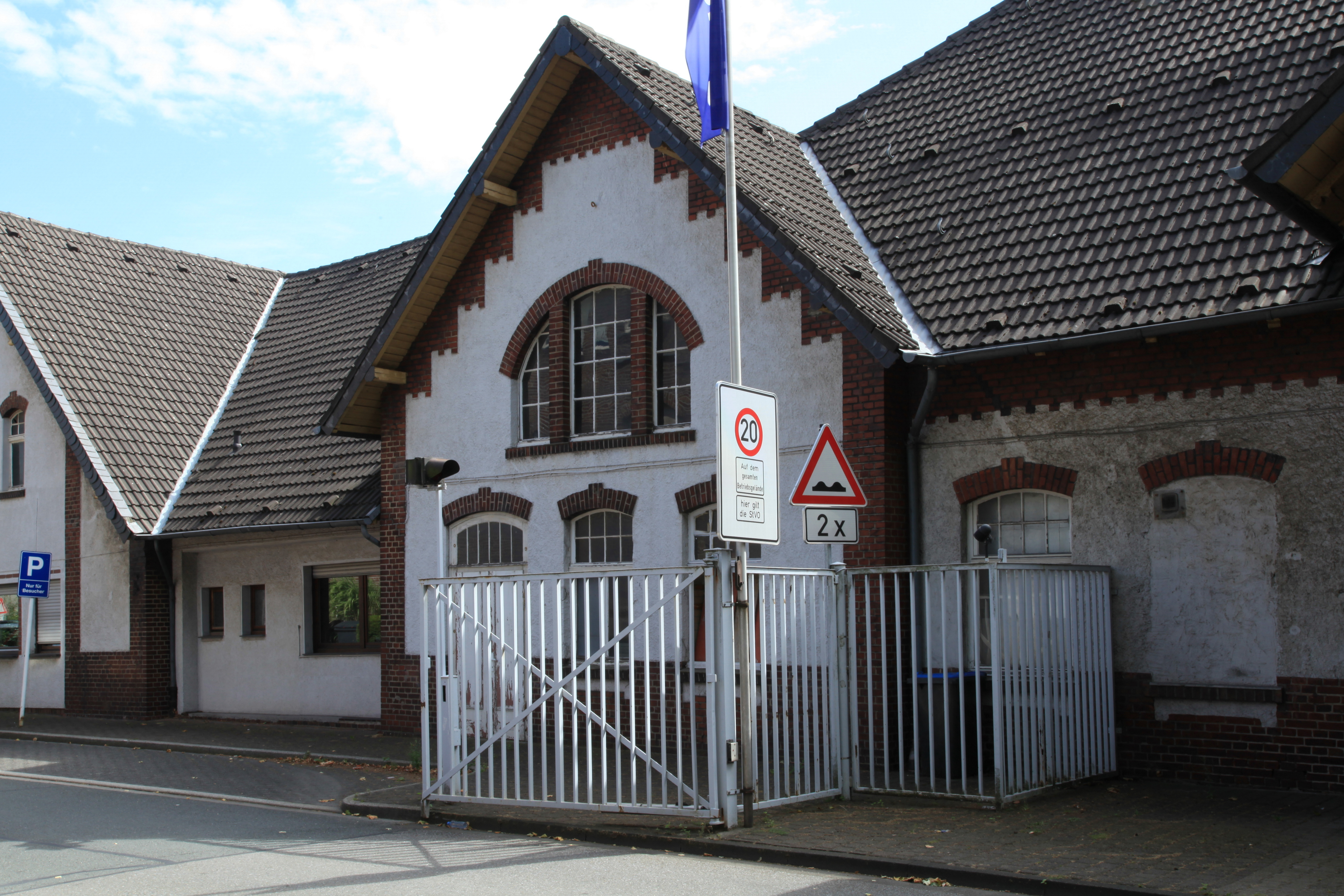 Verbliebenes Torhaus der Zeche Rheinbaben, jetzt auf dem Firmengelände von Eurovia Teerbau GmbH NL Bottrop, Rheinbabenstraße 75 in Bottrop. Die Aufnahmen auf dem eigentlich nicht zugänglichen Firmengelände entstanden mit freundlicher Genehmigung der Eurovia Teerbau GmbH.